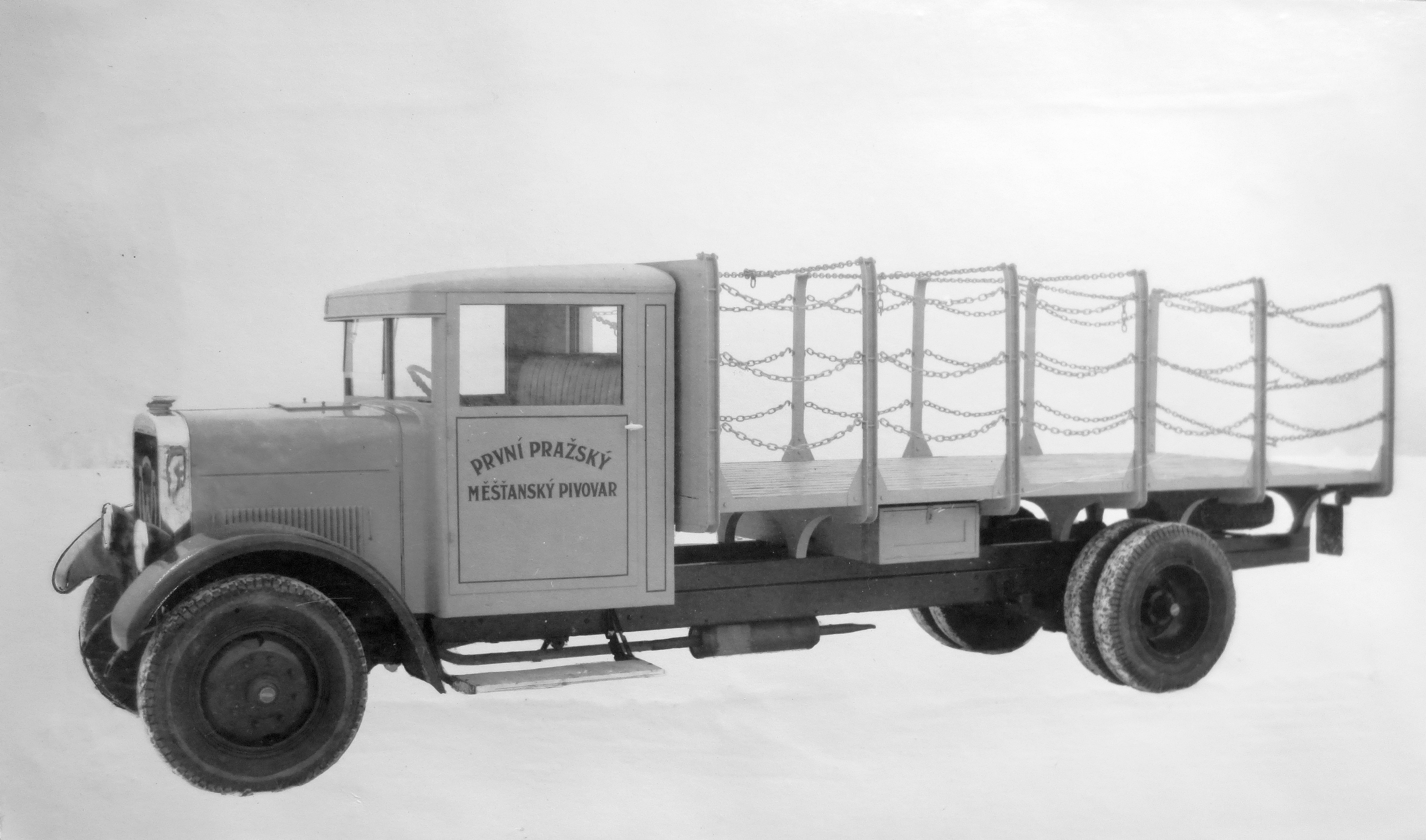 Walter FNA (1931) nákladní valník SOA